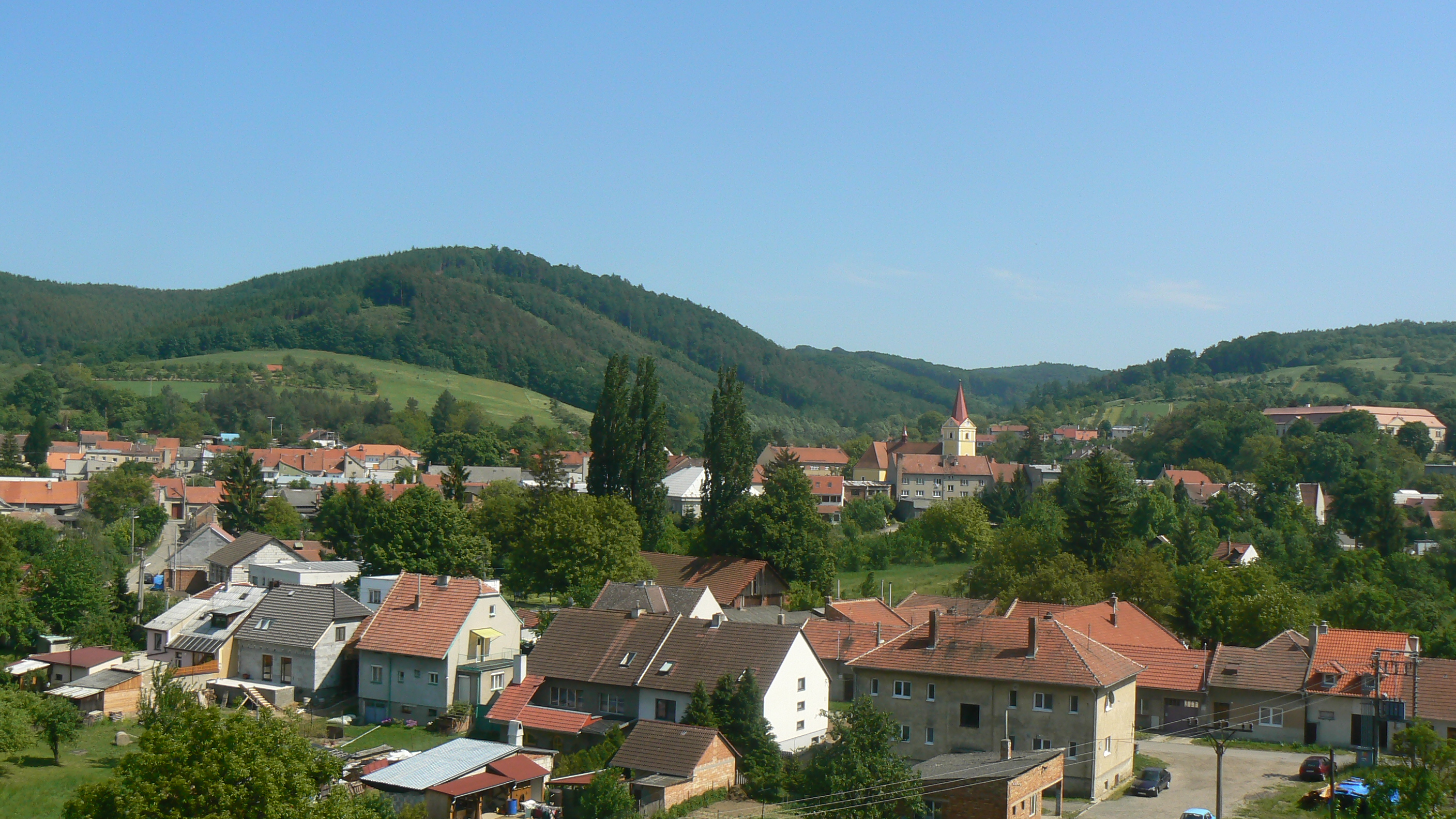 Pohled na městečko Koryčany.